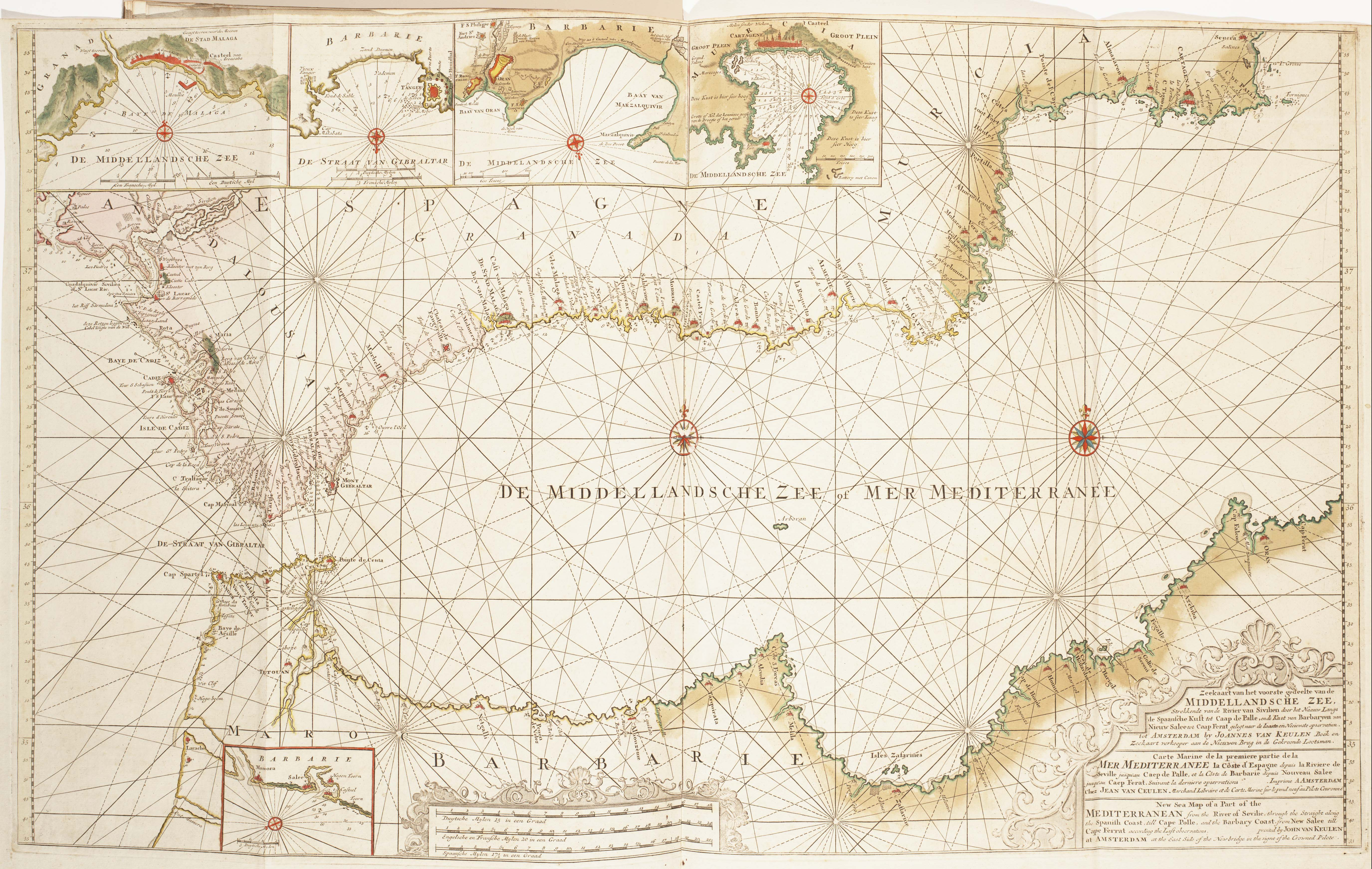 Carte des présides espagnols. "Carte Marine de la première partie de la Mer Méditerranée"